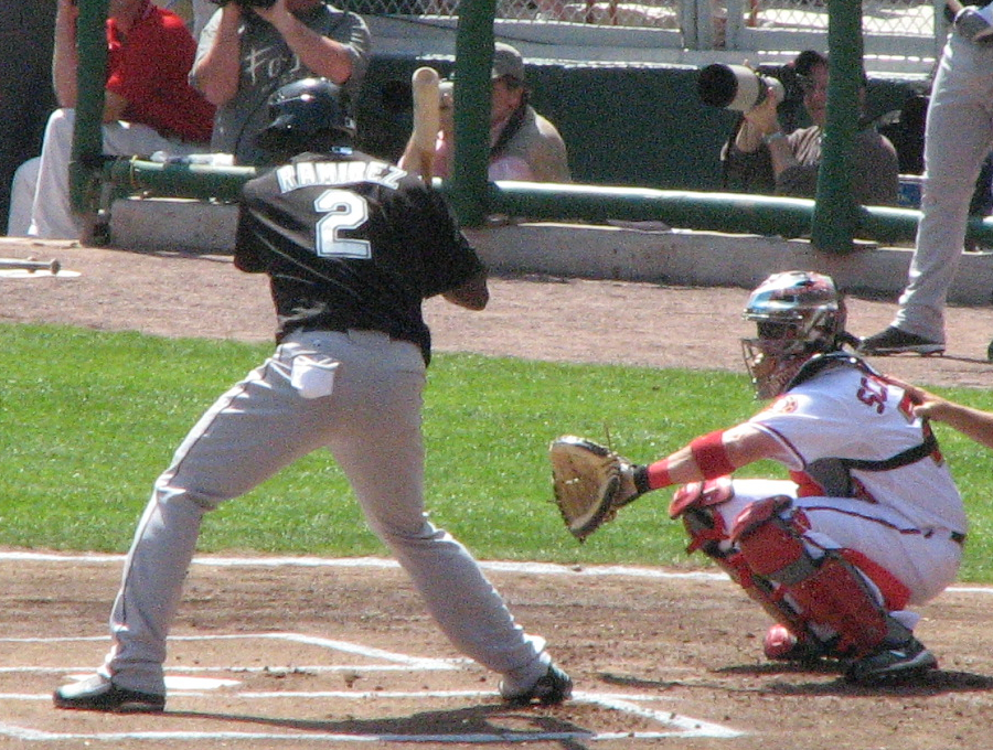 Hanley Ramírez (left) and Brian Schneider